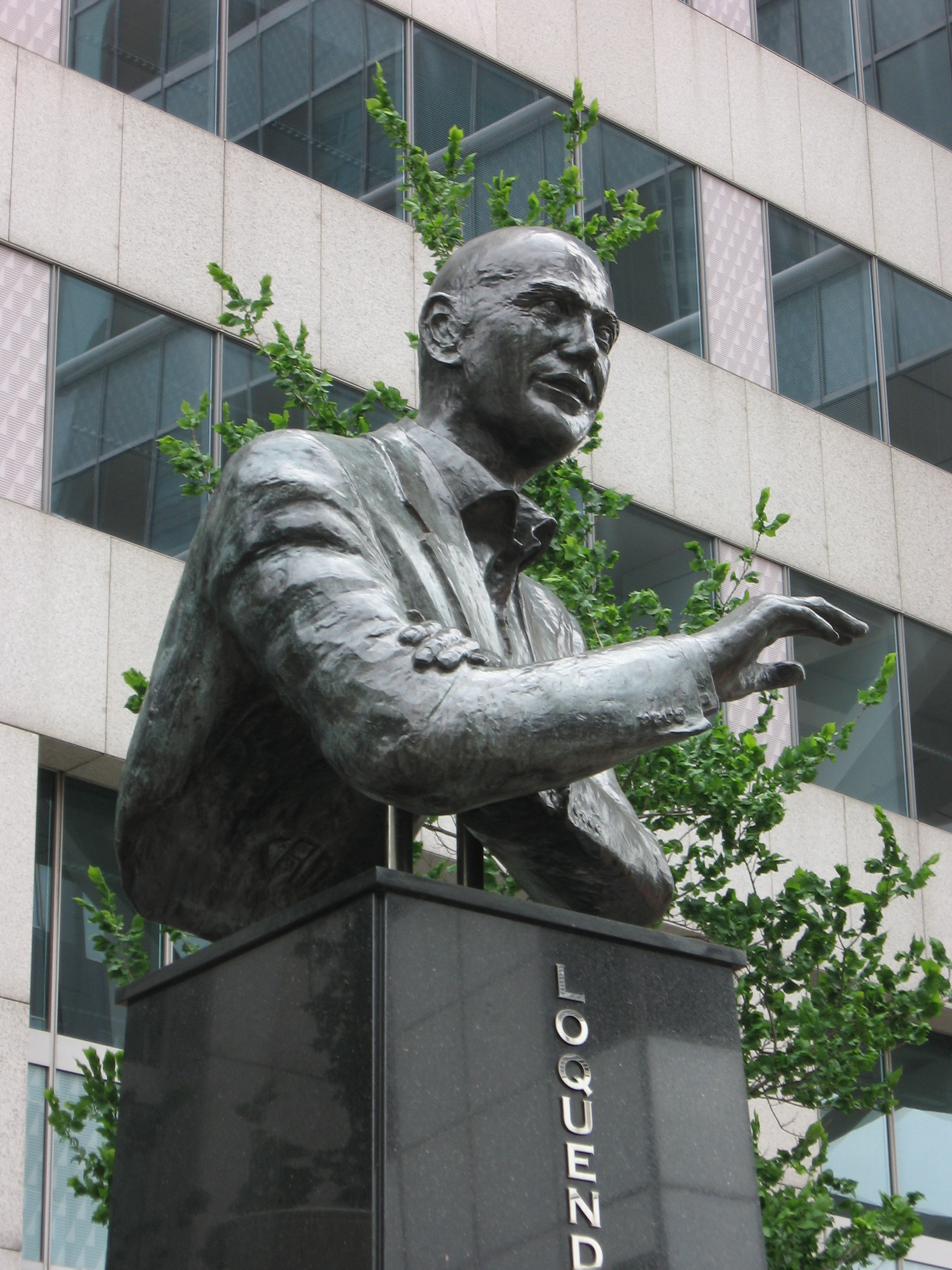 beeld Pim Fortuyn, korte hoogstraat, Rotterdam. Gemaakt door Corry Ammerlaan - van Niekerk